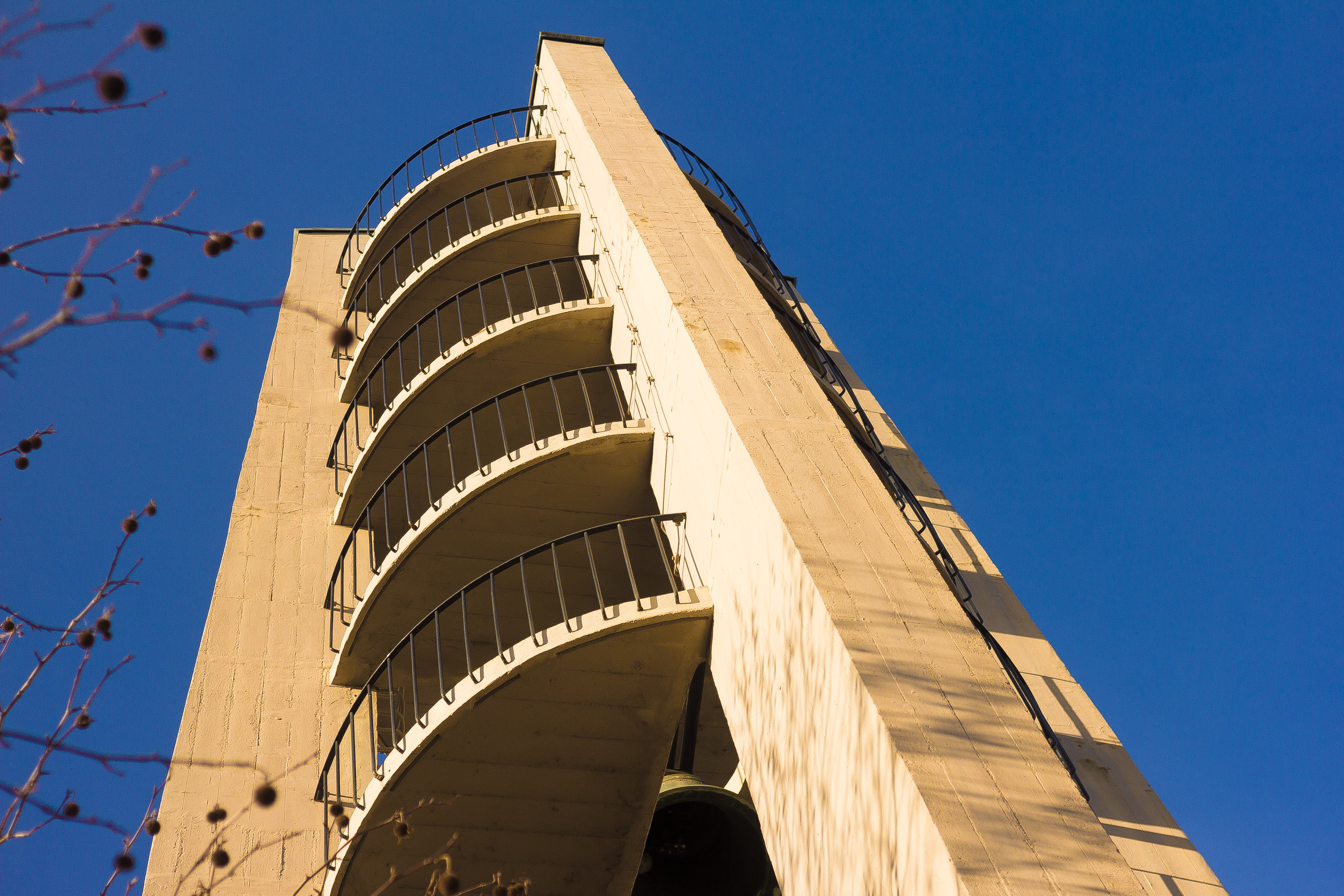 St. Joseph in Köln-Braunsfeld, hier: Turm